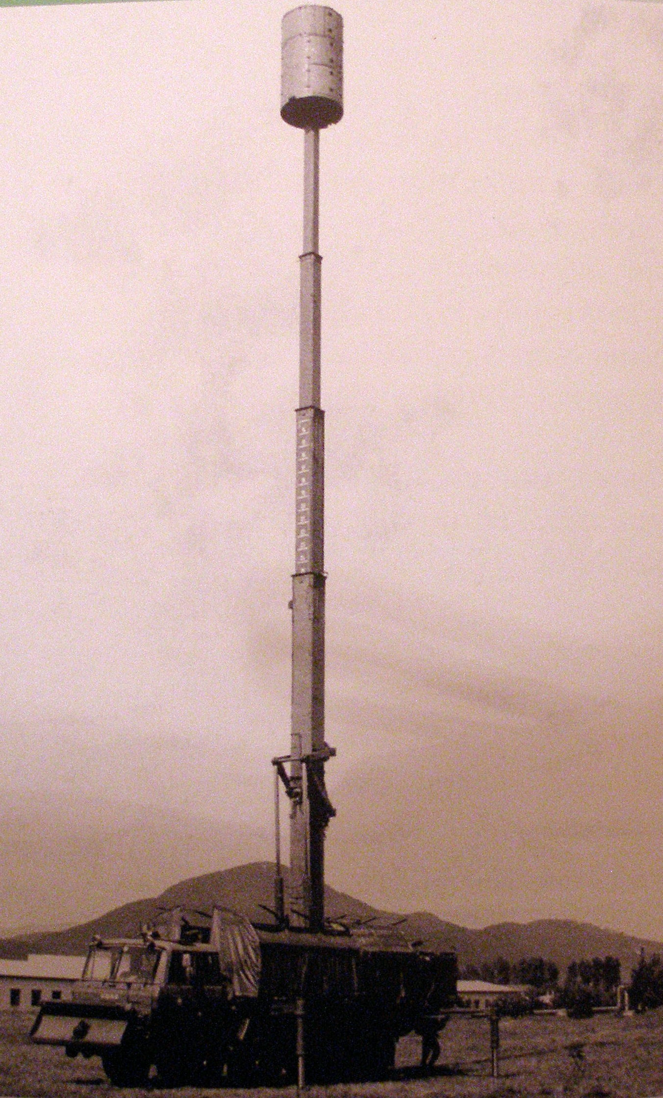 Stará vojenská technika už zrušeného vojenského útvaru 3197 Prešov rok 1991.